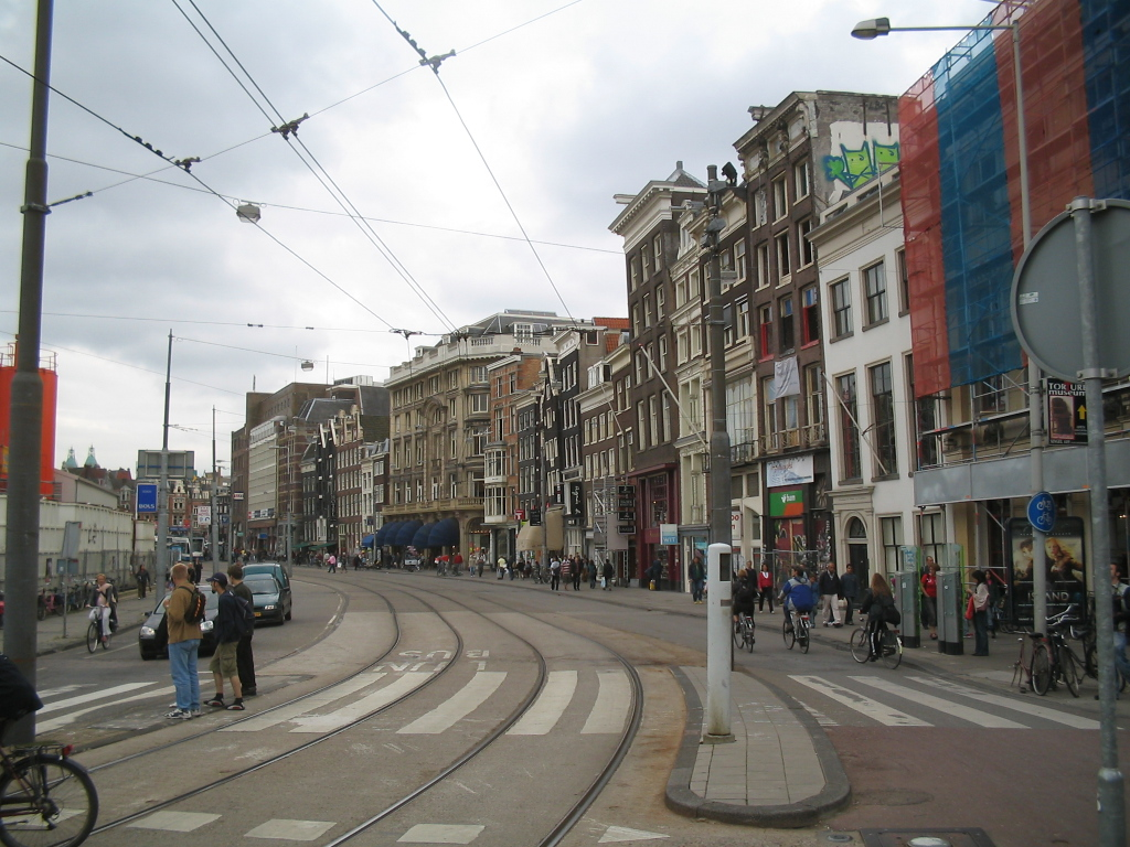 foto augustus 2005